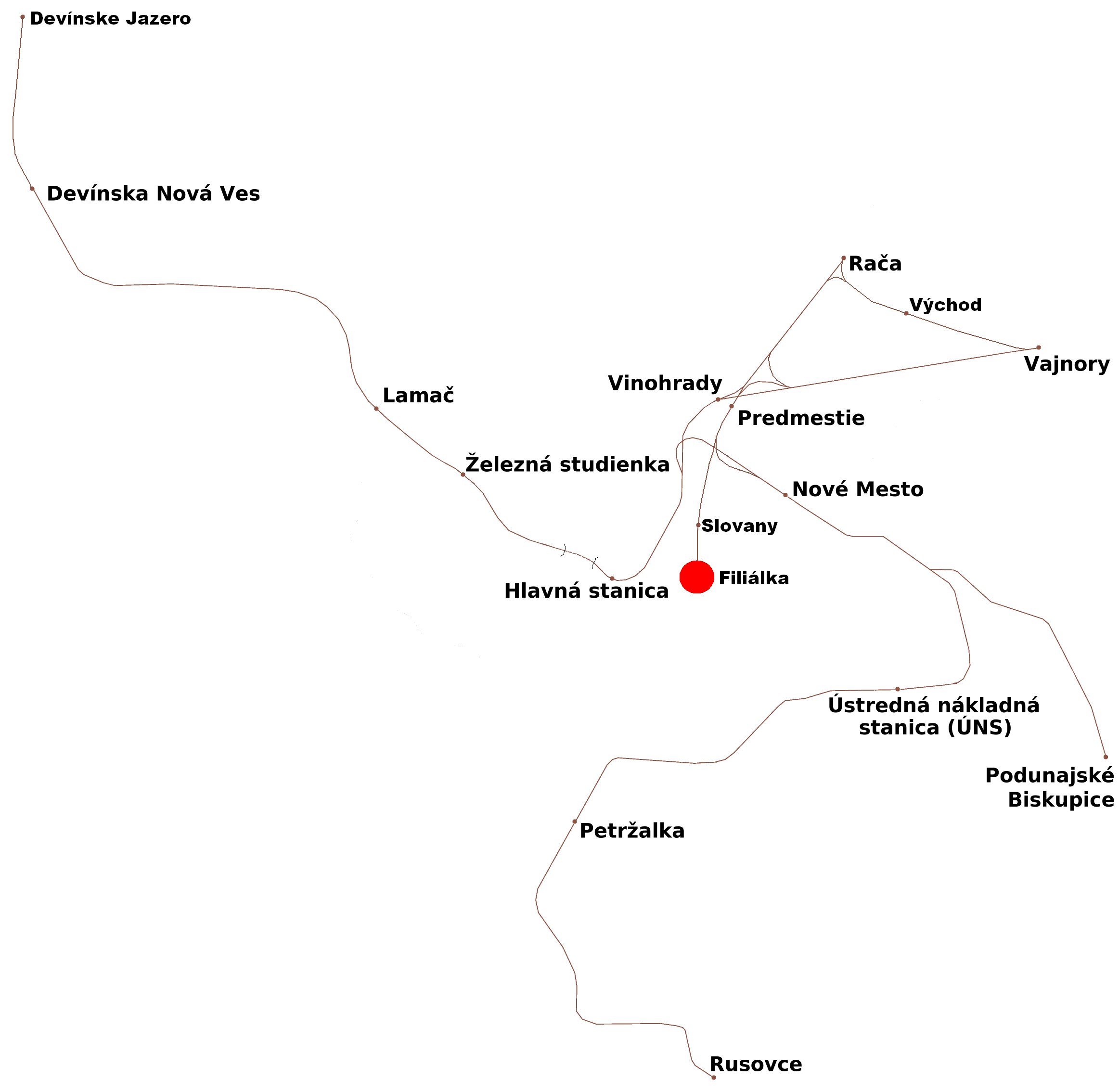 SK - Lokalizácia železničnej stanice Bratislava filiálkaEN - Bratislava filiálka (Slovakia) Railway station locality.